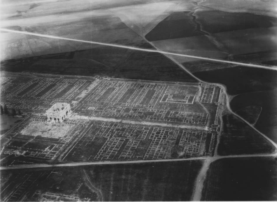 Je suis l'auteur de cette photo de Lambèse, prise depuis un hélicoptère en mars 1962.